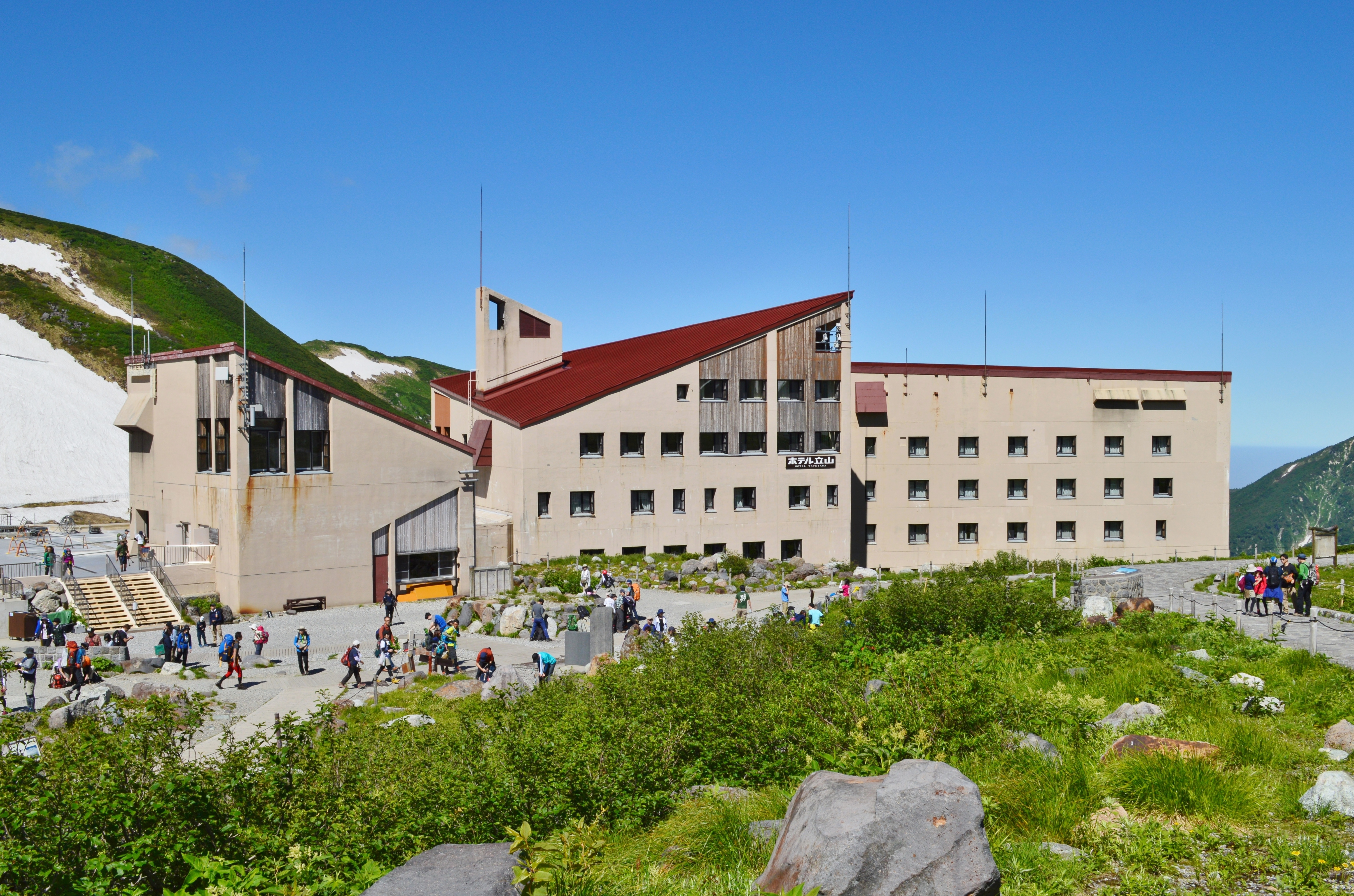 ホテル立山 全景